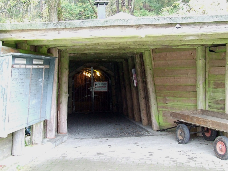 Mundloch des Tannenbergstollns der Zinnerzgrube Tannenberg.